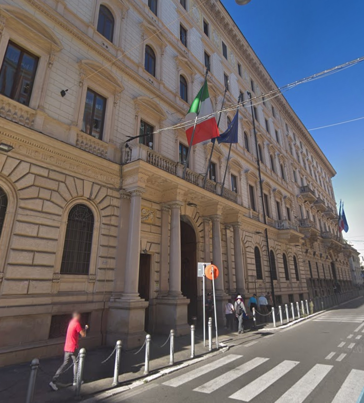 Palazzo Baracchini, sede del ministero della Difesa in via XX Settembre 8, Roma